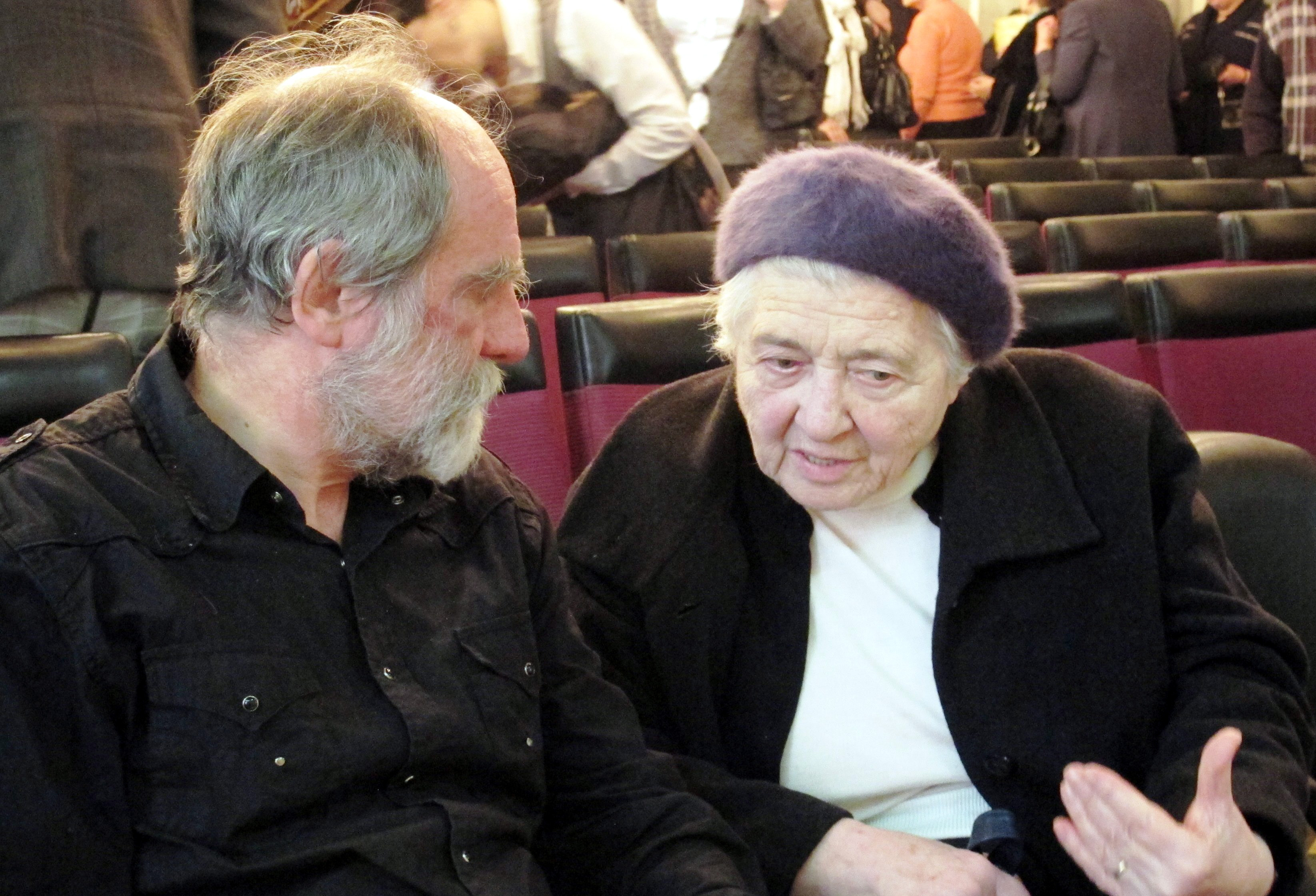 ოსტ გიპერტი და მზექალა შანიძე